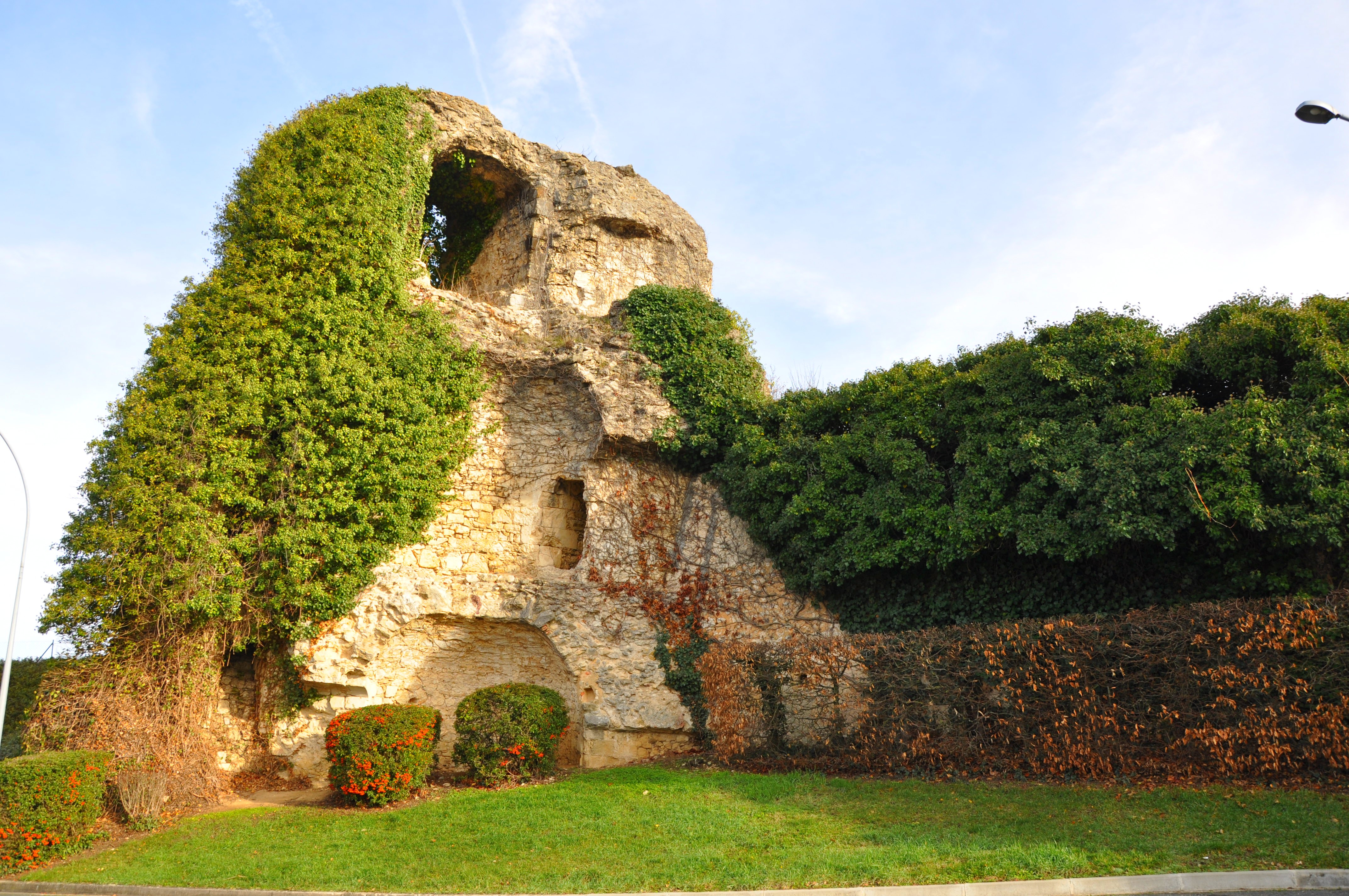 Ruines du château d'Argenton-sur-Creuse